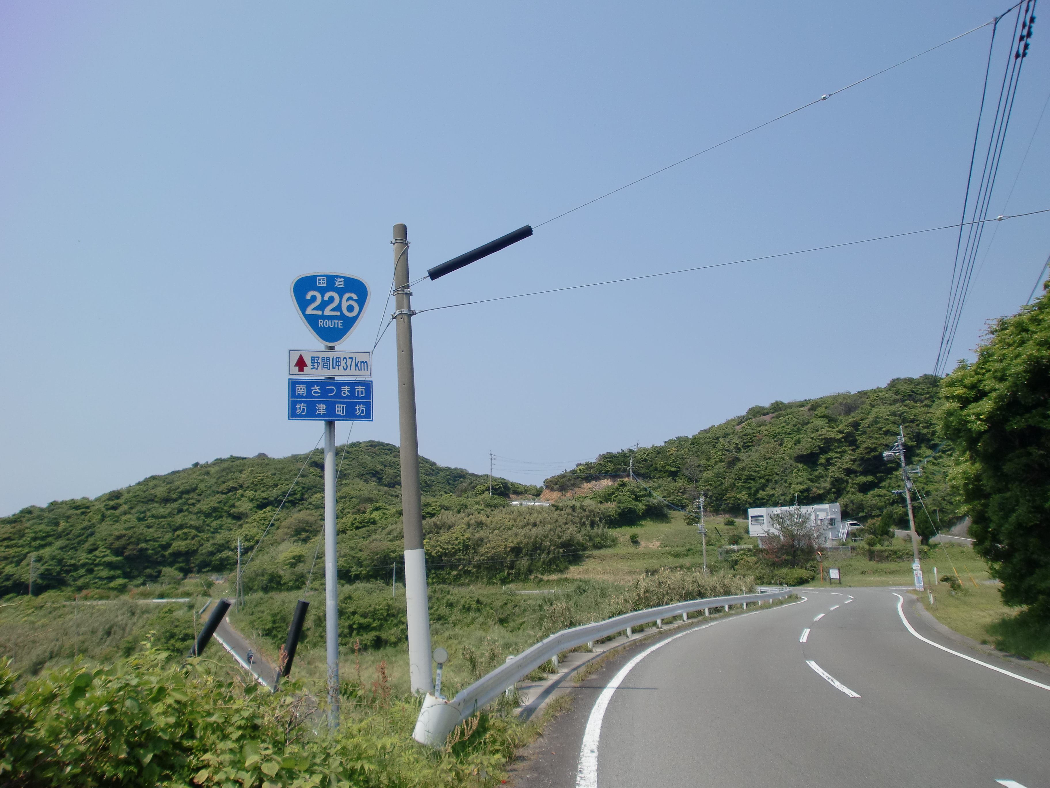 鹿児島県南さつま市坊津町坊付近を通る国道226号。